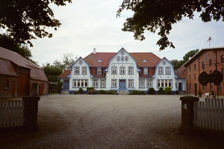 Eigenes Foto, Hofbesitzer einverstanden.